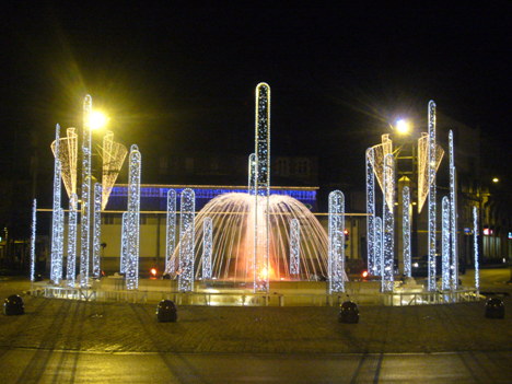 Illuminations de la place Carnot à Limoges (Haute-Vienne, France)